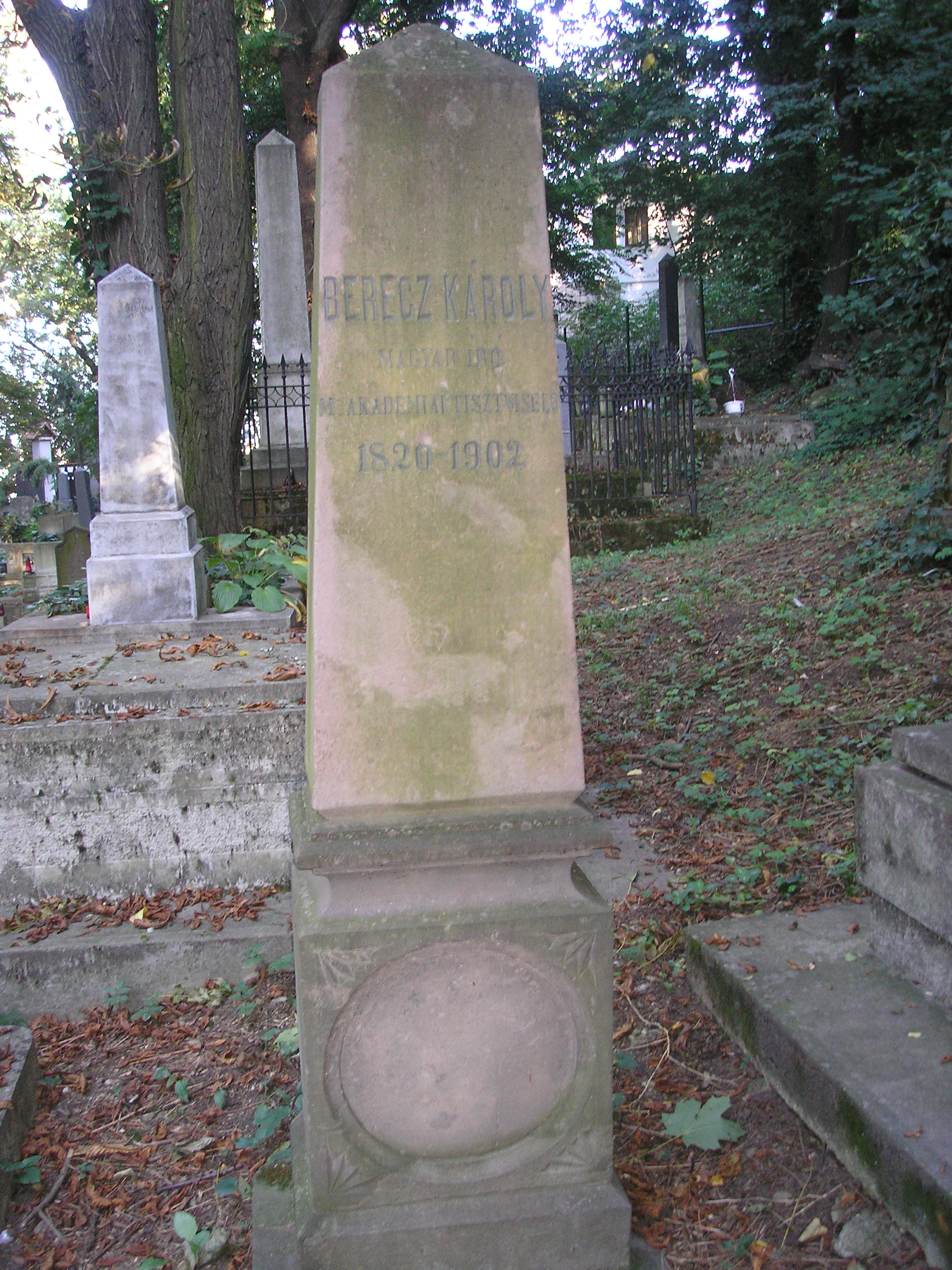 Berecz Károly ügyvéd, költő, újságíró sírja a miskolci Avasi temetőben